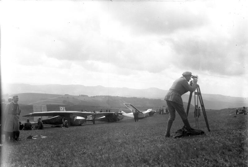 Von den Segelflugwettbewerben in der Rhön, bei welchem der deutsche Segelflugmeister [Günter] Groenhoff, den Tod fand ! Startbereite Maschinen am Hang der Wasserkuppe. Im Vordergrund ein Windmesser zur Prüfung der Windverhältnisse.